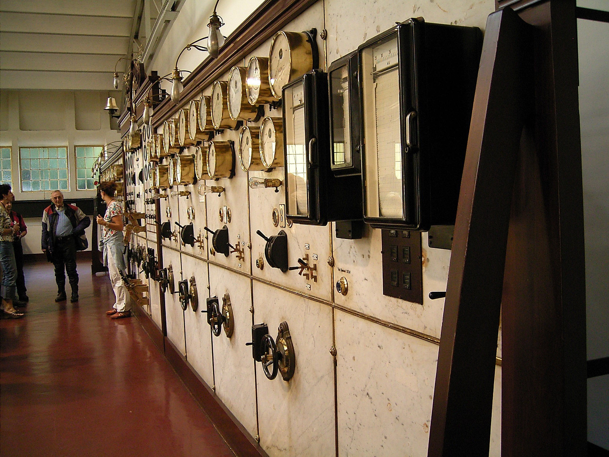 Jugendstil-Kraftwerk in Heimbach / Art Nouveau power plant in Heimbach, Germany